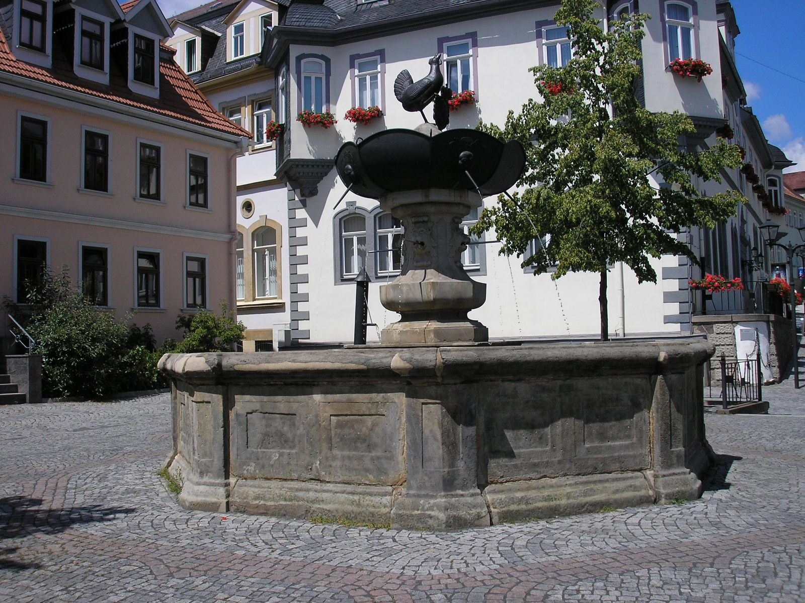 Der Hennebrunnen auf dem Marktplatz von Ilmenau (Thüringen).